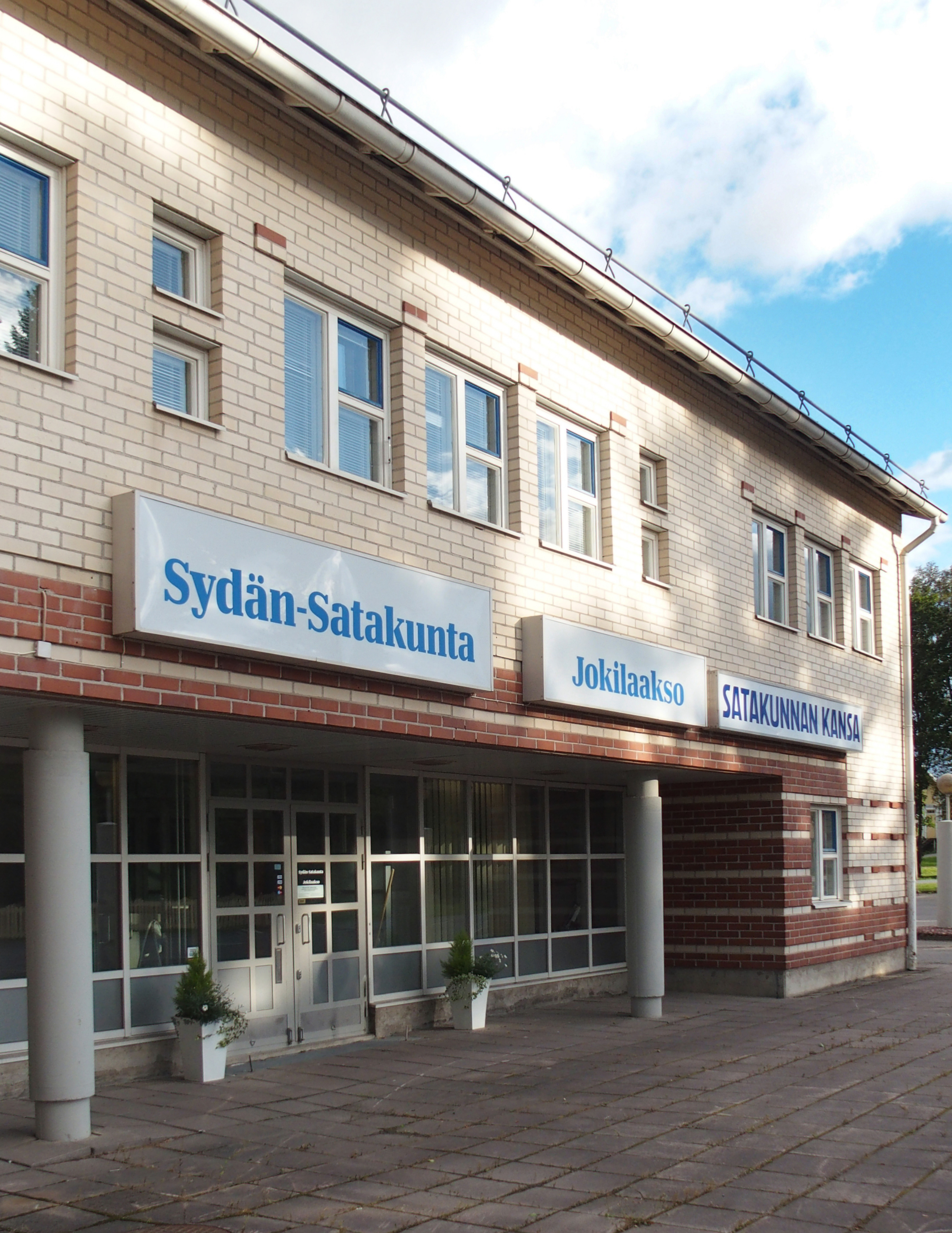 Lehtien konttori Kokemäellä